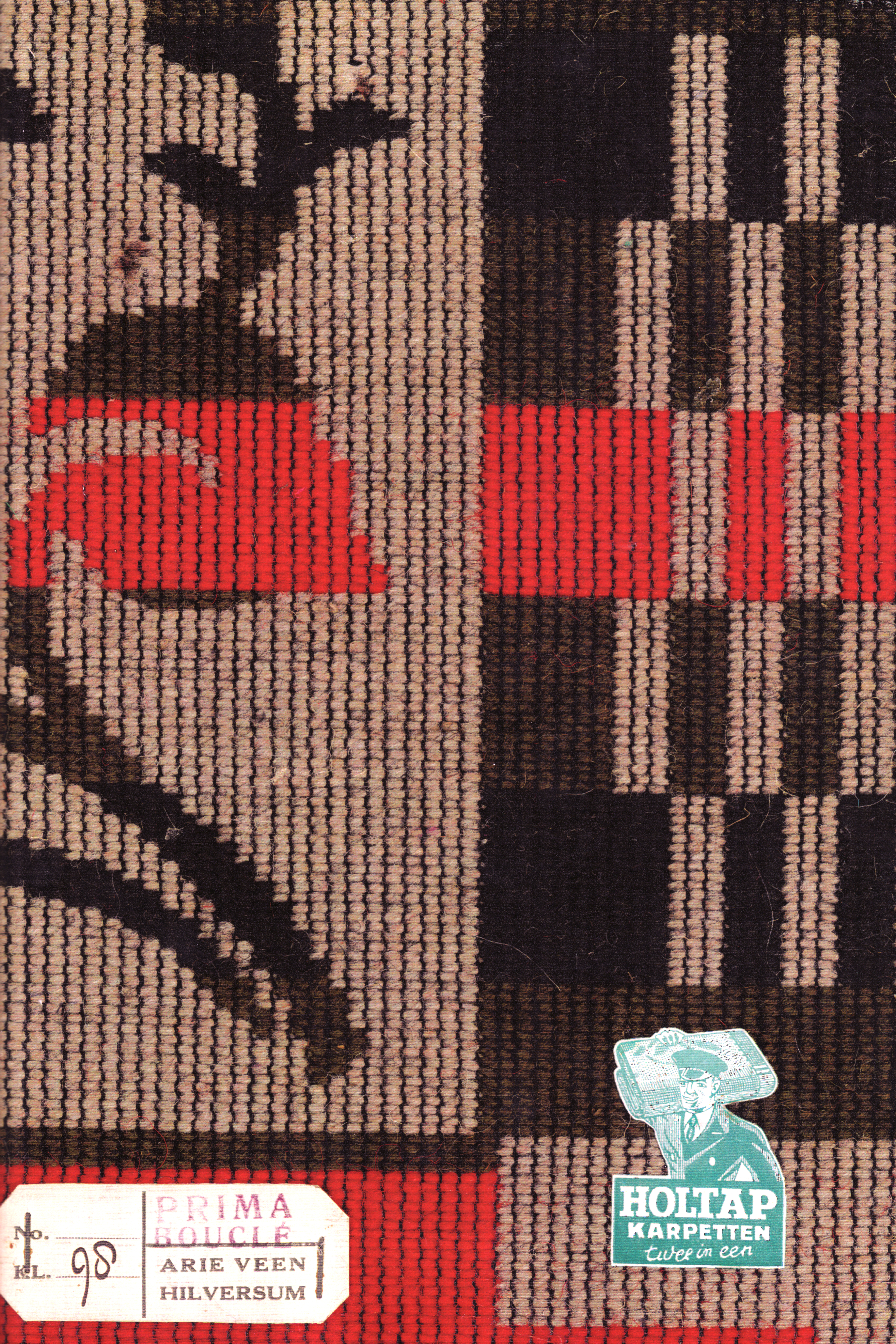 Voorbeeld van een Holtap karpet